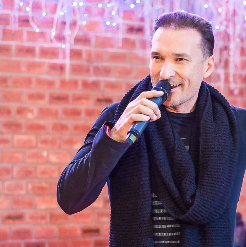 Фото Андрея Берестенко на выступлении